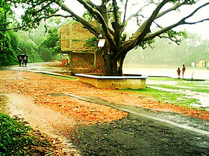 Centre point